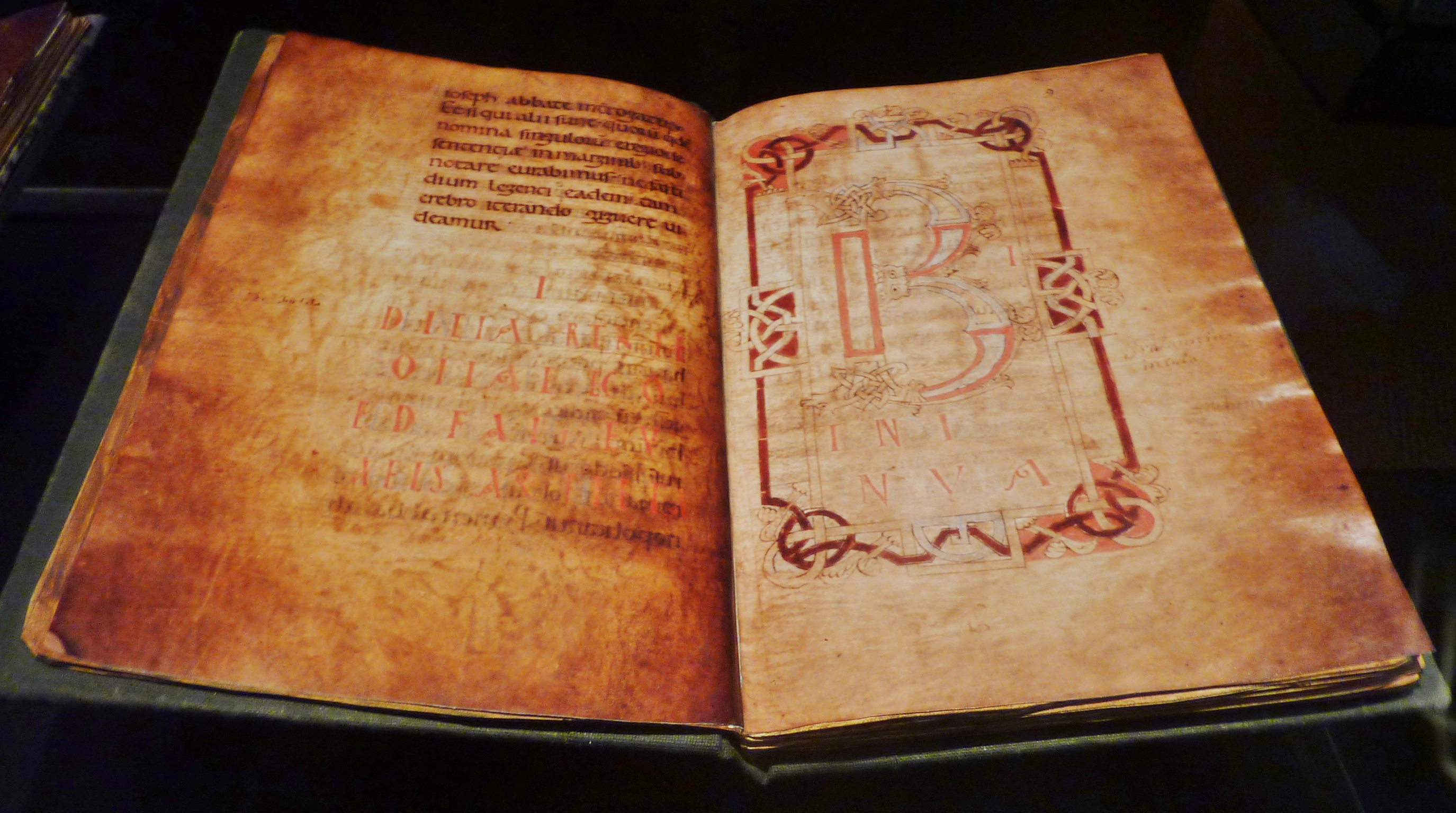 Cartulaire de Landévennec (parchemin du XIe siècle), fac-similé d'une double page (Musée de l'Ancienne abbaye de Landévennec, l'original se trouve à la Bibliothèque municipale de Quimper)